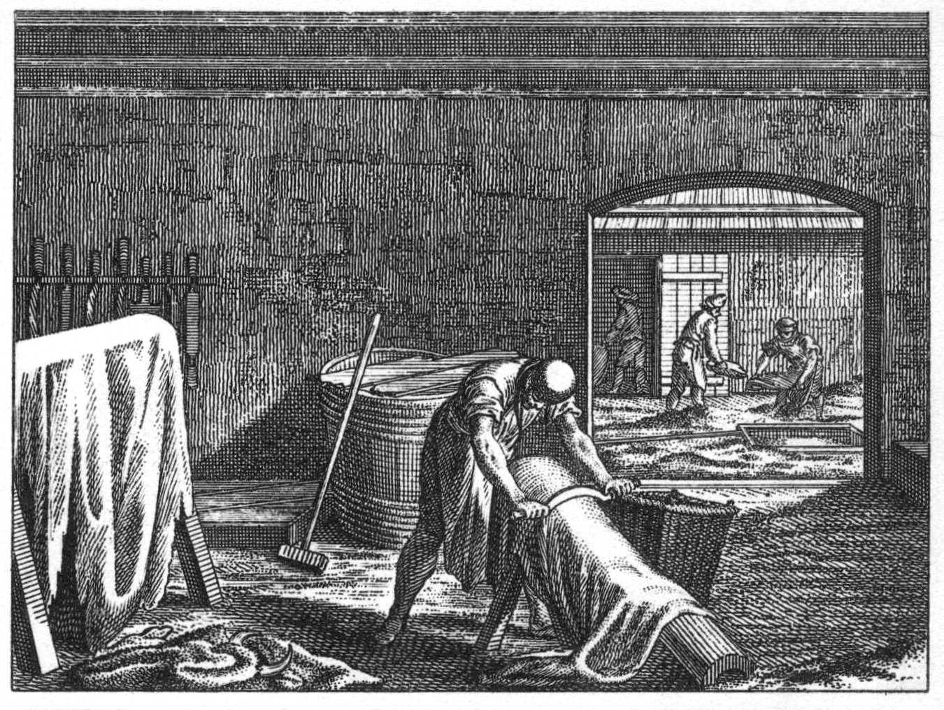 Tab. LV. Handwerke und Künste. b) Der Gerber, welcher das auf dem Bock gelegte Leder abschabt; neben ihm eine Kalkgrube; weiterhin eine Lohgrube. Allerlei Werkzeug. (Beschreibung lt. Quelle)